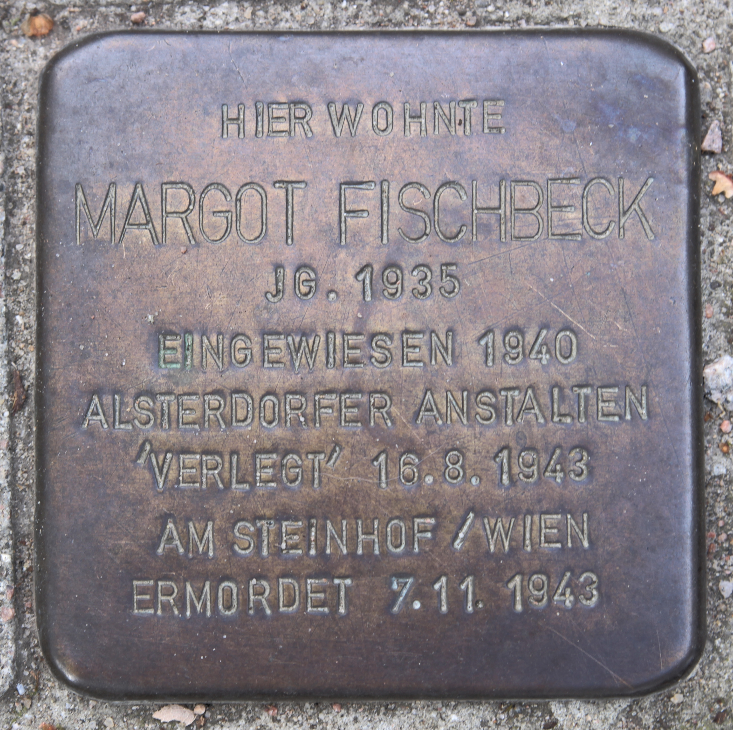 Stolperstein für Margot Fischbeck in der August-Bebel-Straße 101 – 105 in Hamburg-Bergedorf